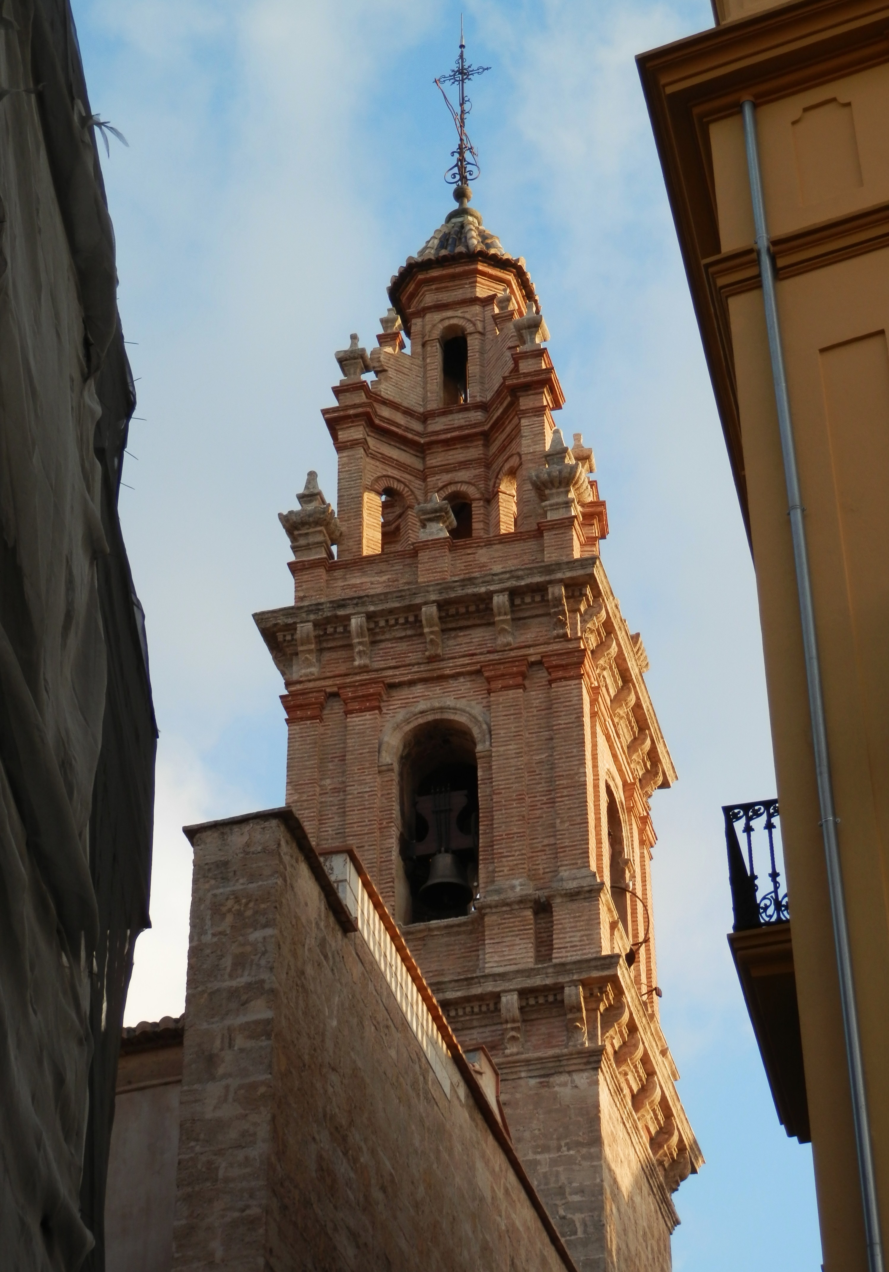 Campanar de l'església de sant Esteve, València.